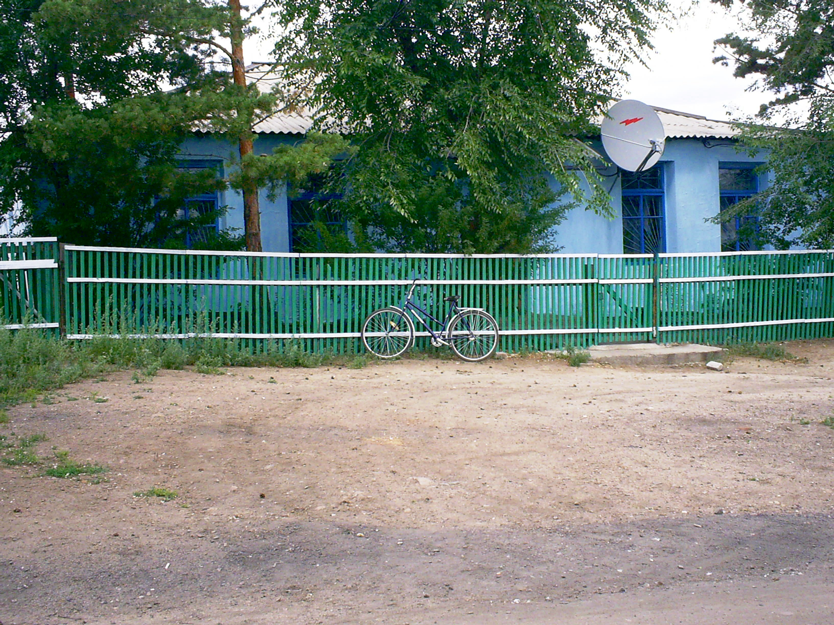 Укурей